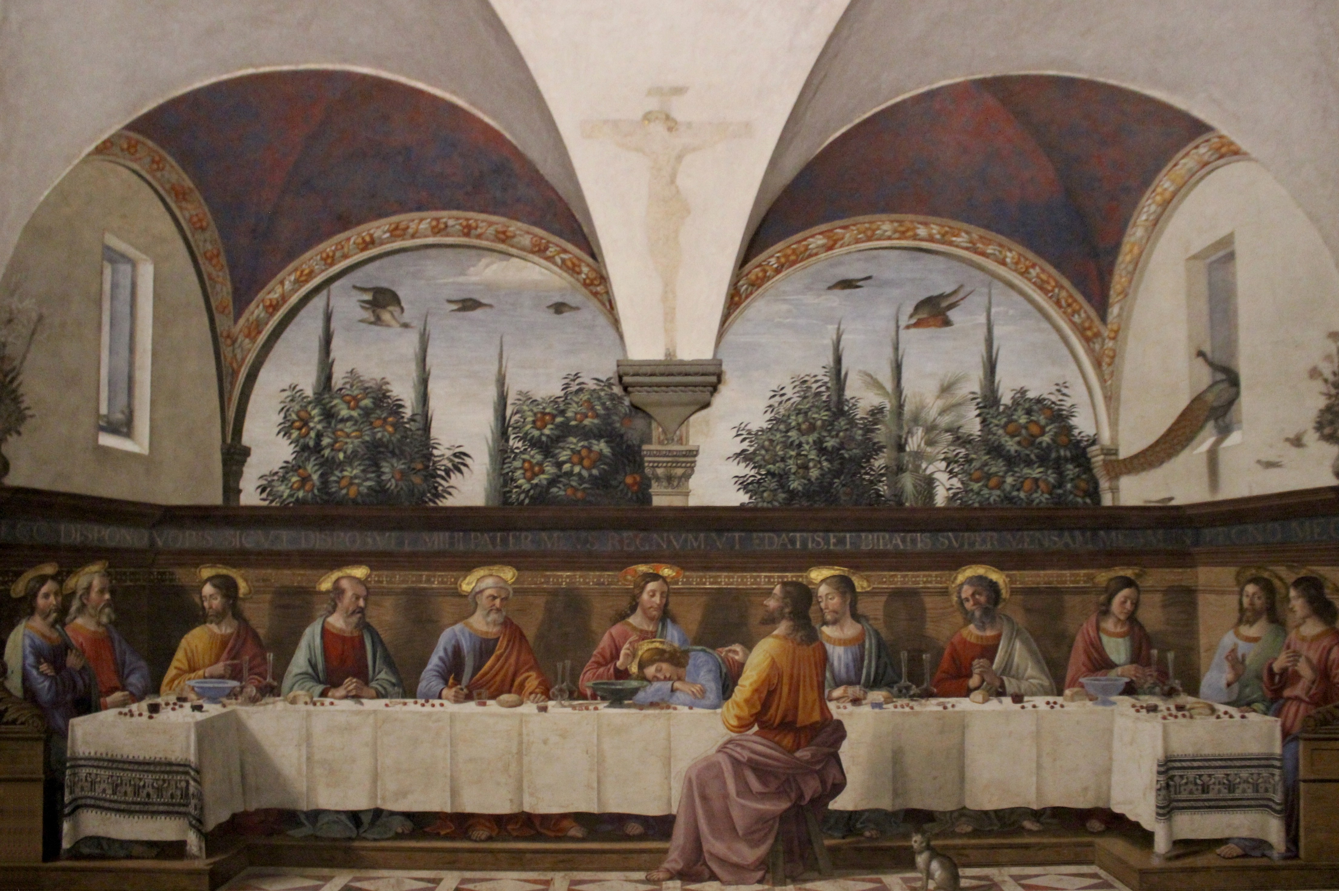 Ghirlandaio. Última Cena. Florencia, San Marco.